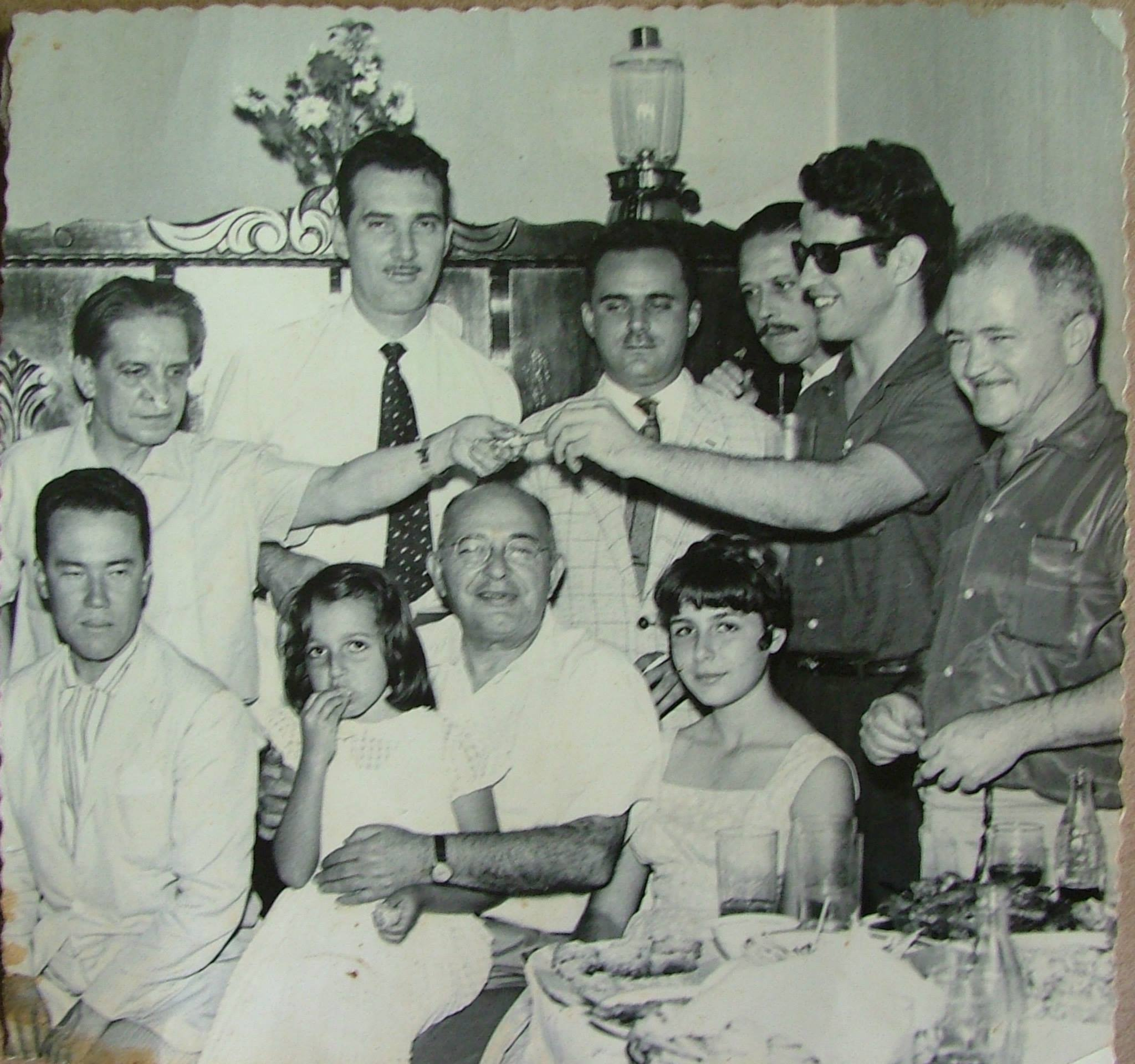 Photos under the power of the Mandel Julien Family